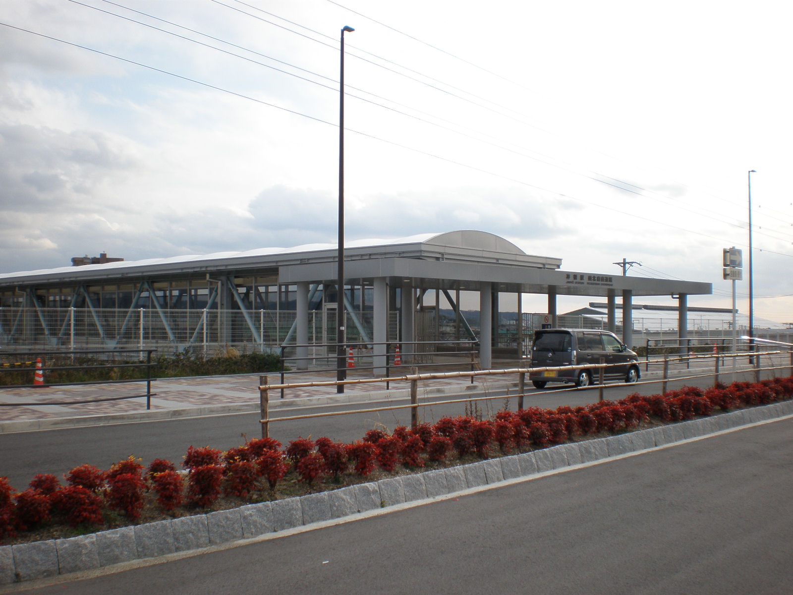 愛知県春日井市にある神領駅の北口